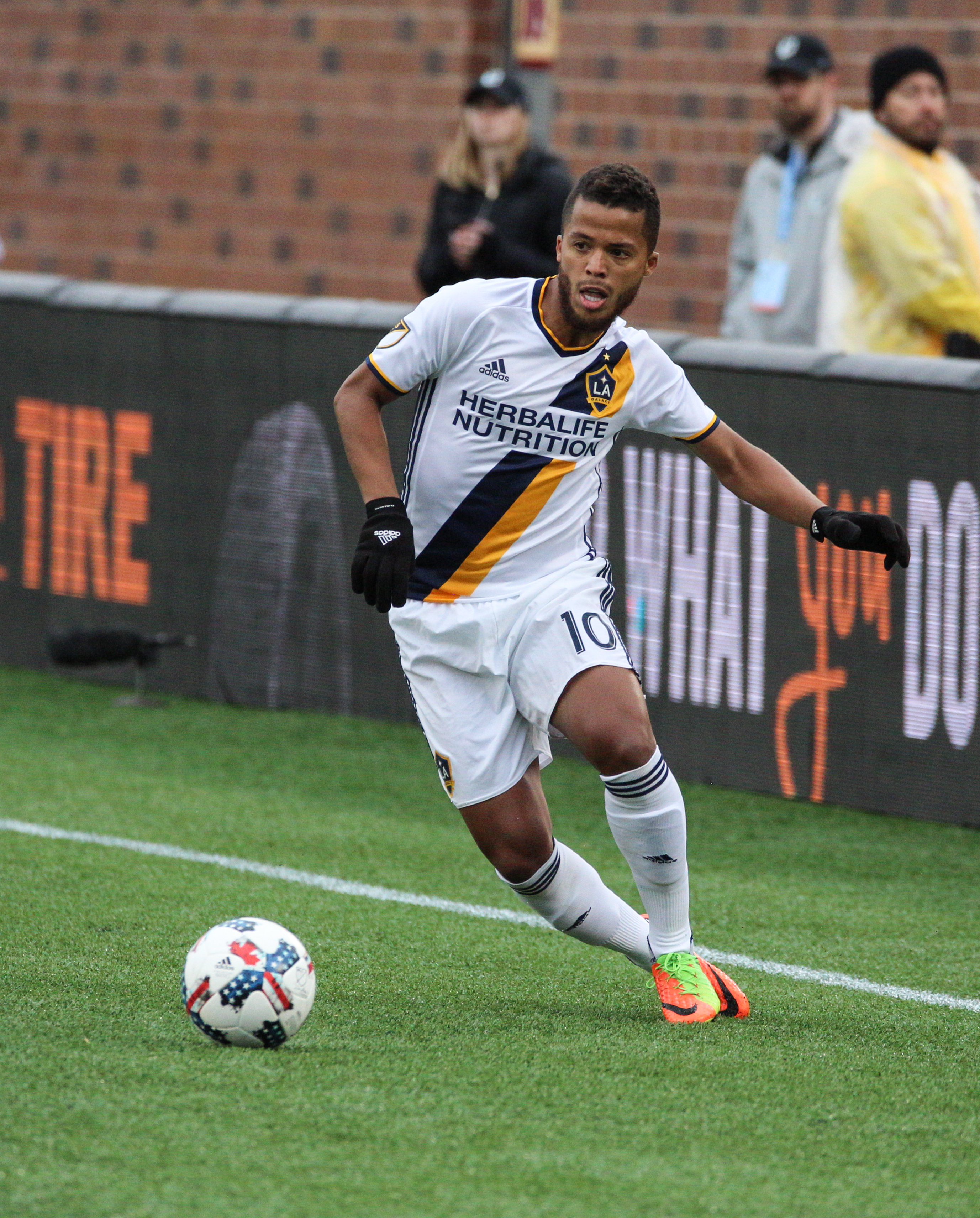 Dos Santos - MLS - LA Galaxy - Soccer